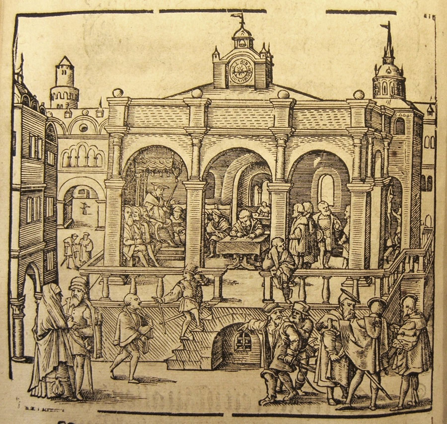 Frančiškanski samostan Novo mesto